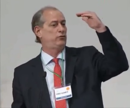 CIRO GOMES FAZ PALESTRA EM CAMBRIDGE, À CONVITE DOS ALUNOS DE HARVARD E MIT, ORGANIZADORES DA "BRAZIL CONFERENCE" Ciro Gomes foi um dos convidados da "Brazil Conference" para proferir palestra com o tema "Politics as the Solution" ("A política como solução") no Brazil Conference. Um evento organizado pelos alunos de Harvard e MIT, em Cambridge, Massachusetts, no dia 23 de Abril de 2016.